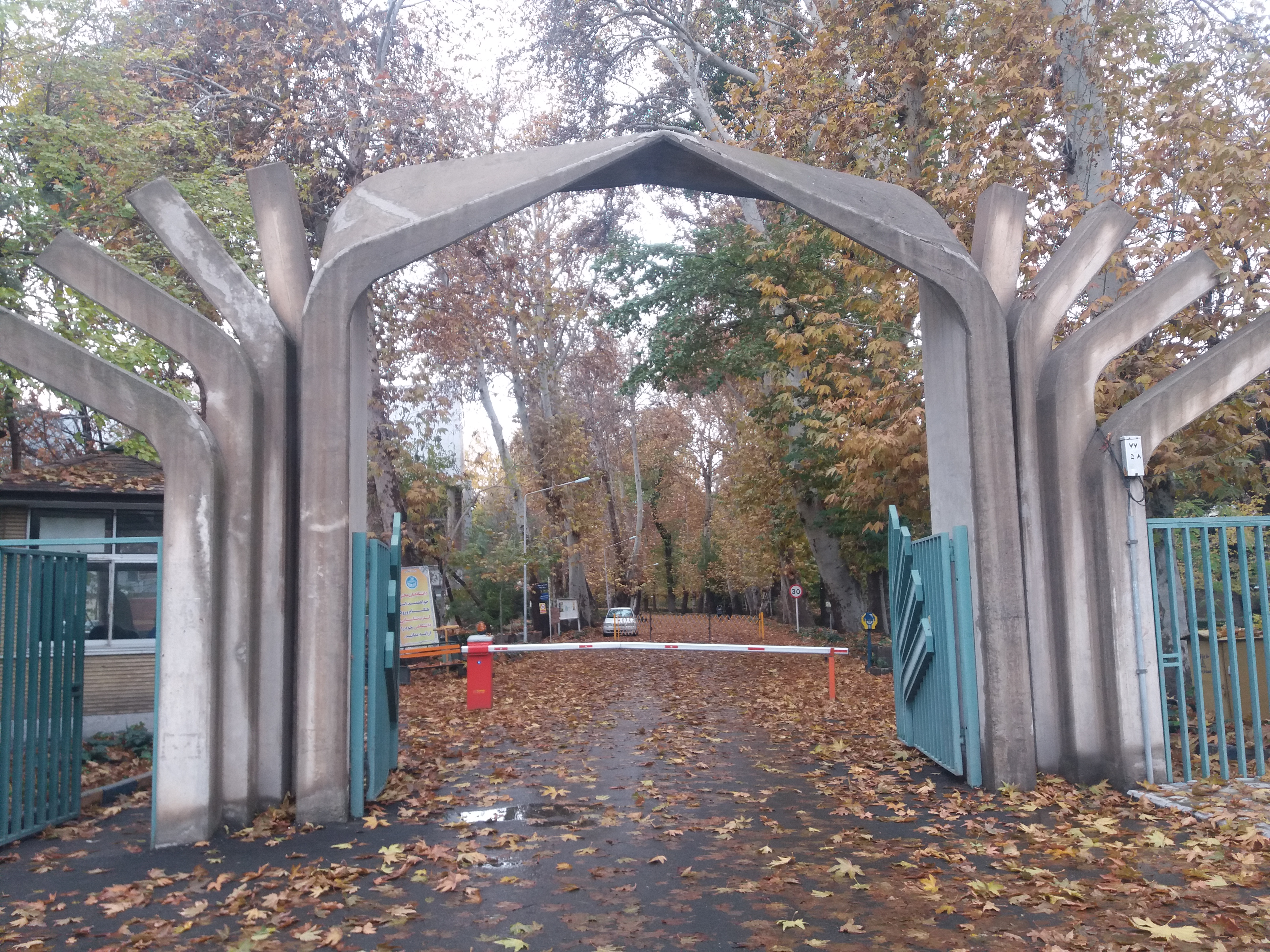 تصویری زیبا از سر در پردیس کشاورزی و منابع طبیعی در یک روز پاییزی